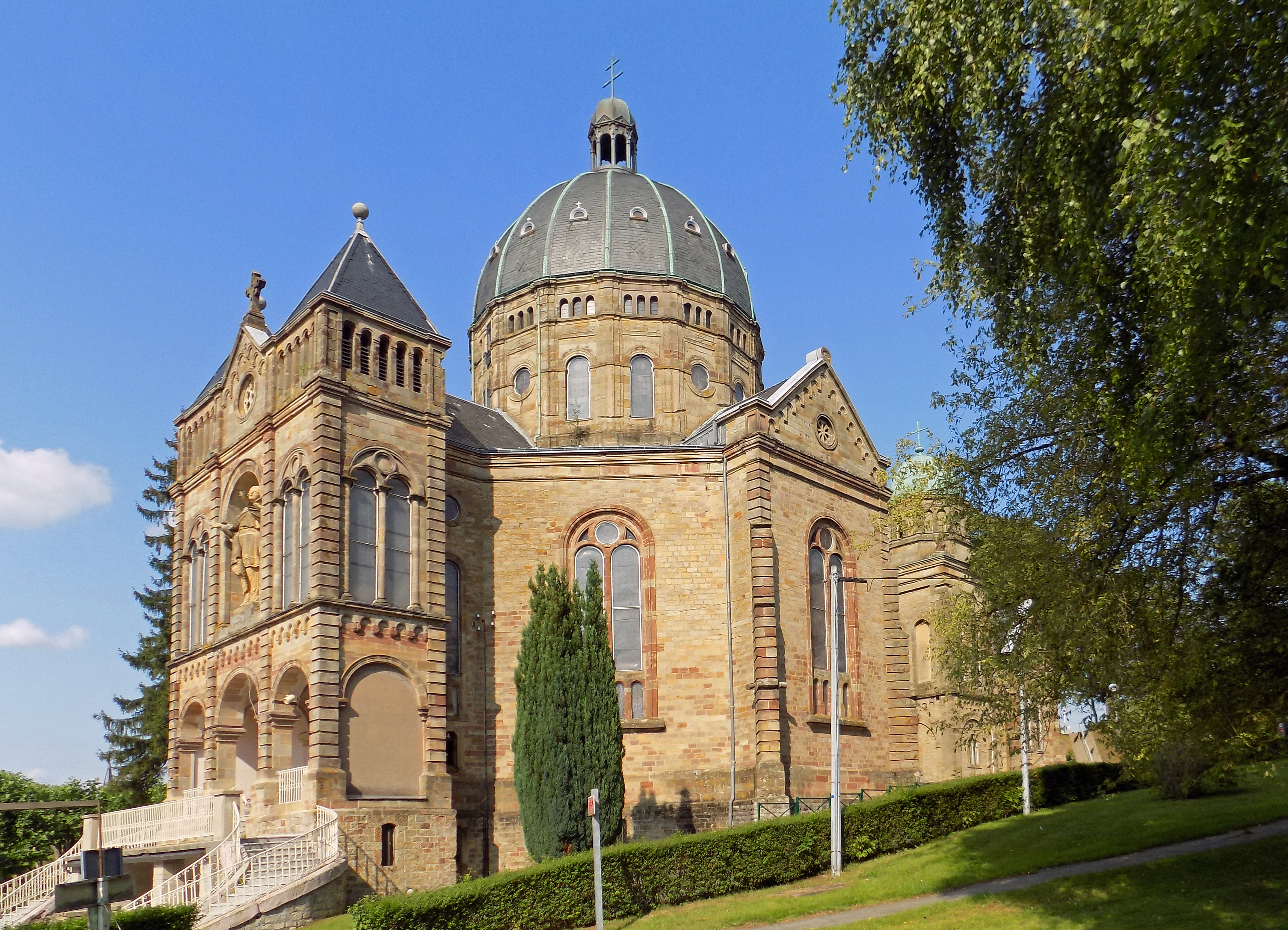 Basilique Notre-Dame-de-Bon-Secours de Saint-Avold, basilique mineure. Sanctuaire fondé au XVIe siècle et dédié à Notre-Dame-de-Bon-Secours. Pèlerinage marial. Vue latérale.